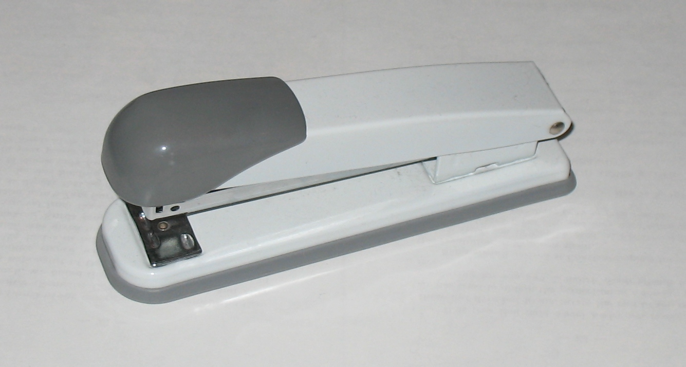 a stapler (ein Tacker)